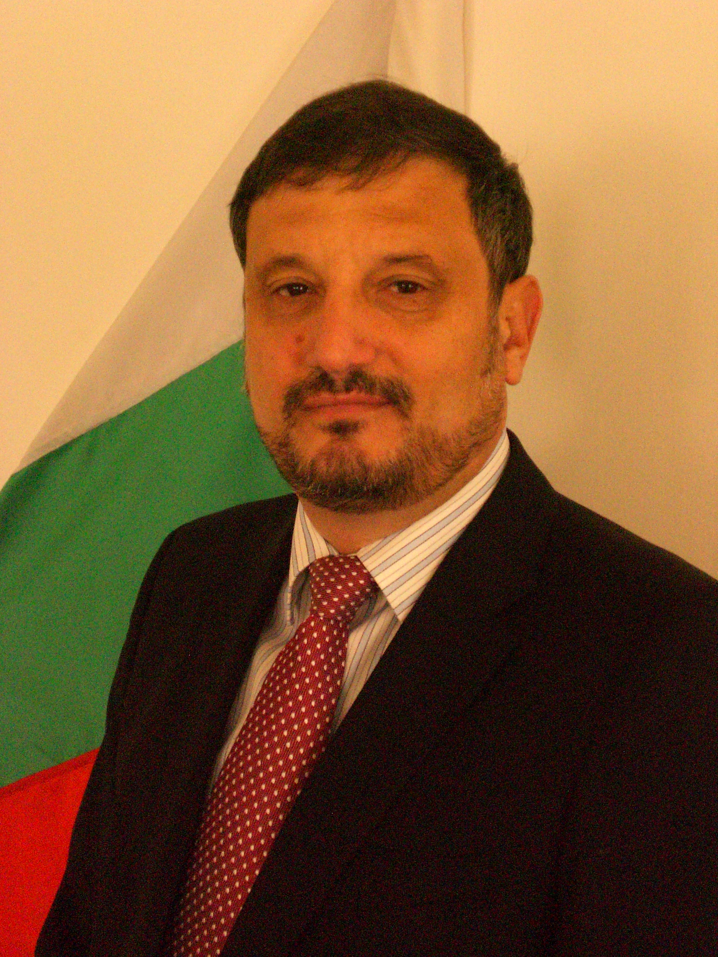 Николай Янков, извънреден и пълномощен посланик на България в ИР Афганистан (2012-2016)